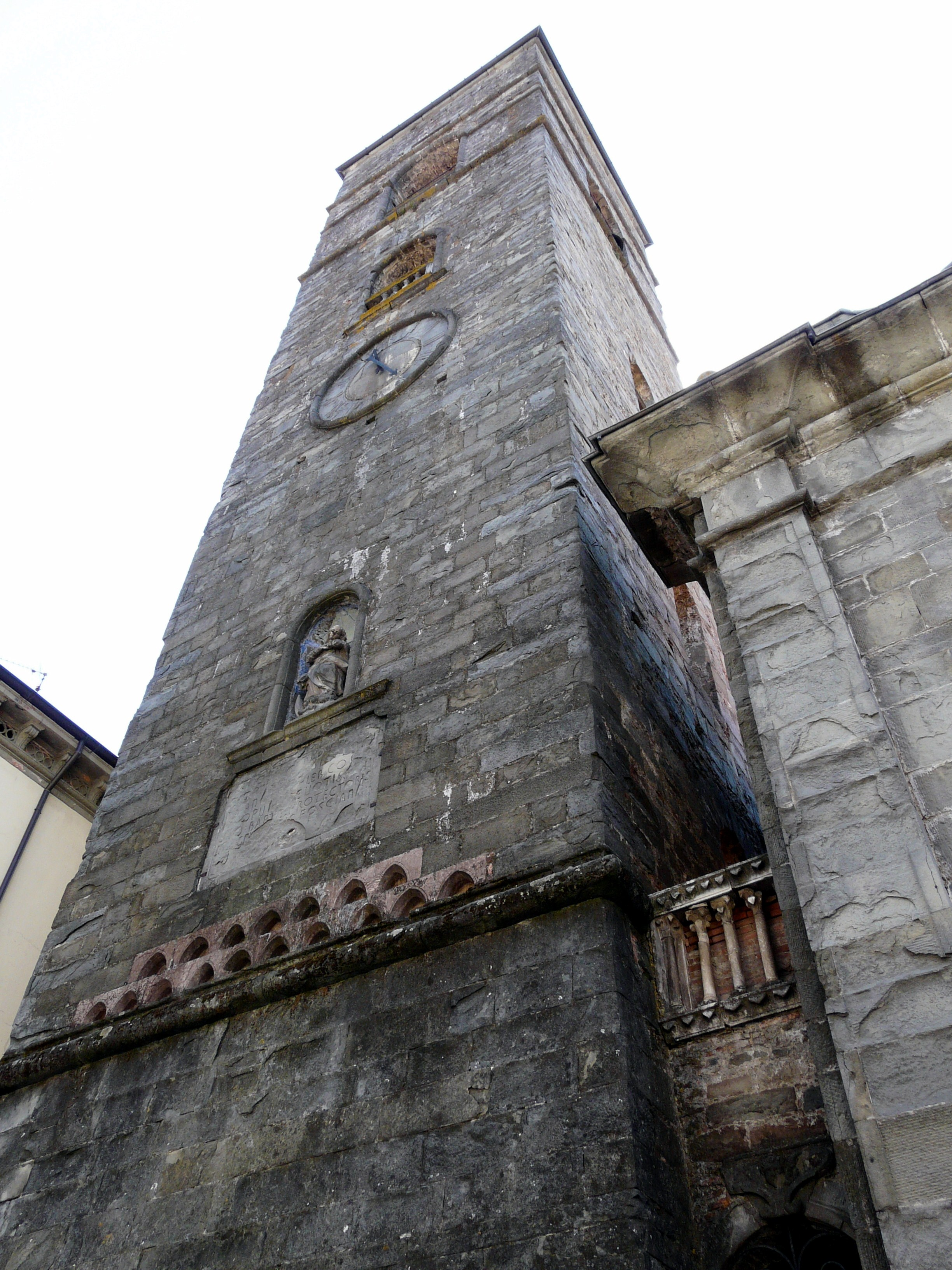 Campanile della chiesa di San Giovanni Battista, Pieve Fosciana, Toscana, Italia